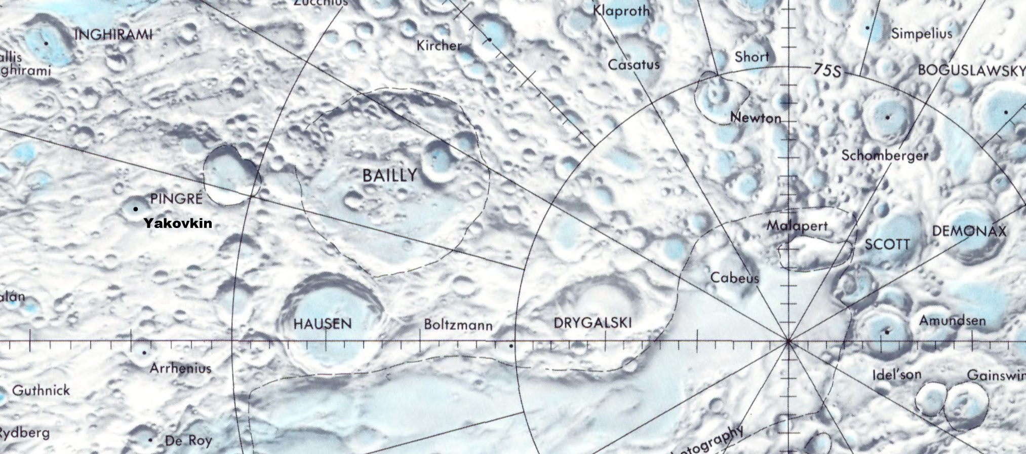 Cráter lunar Yakovkin. Localización. (Lunar Chart LPC1. Second Edition)